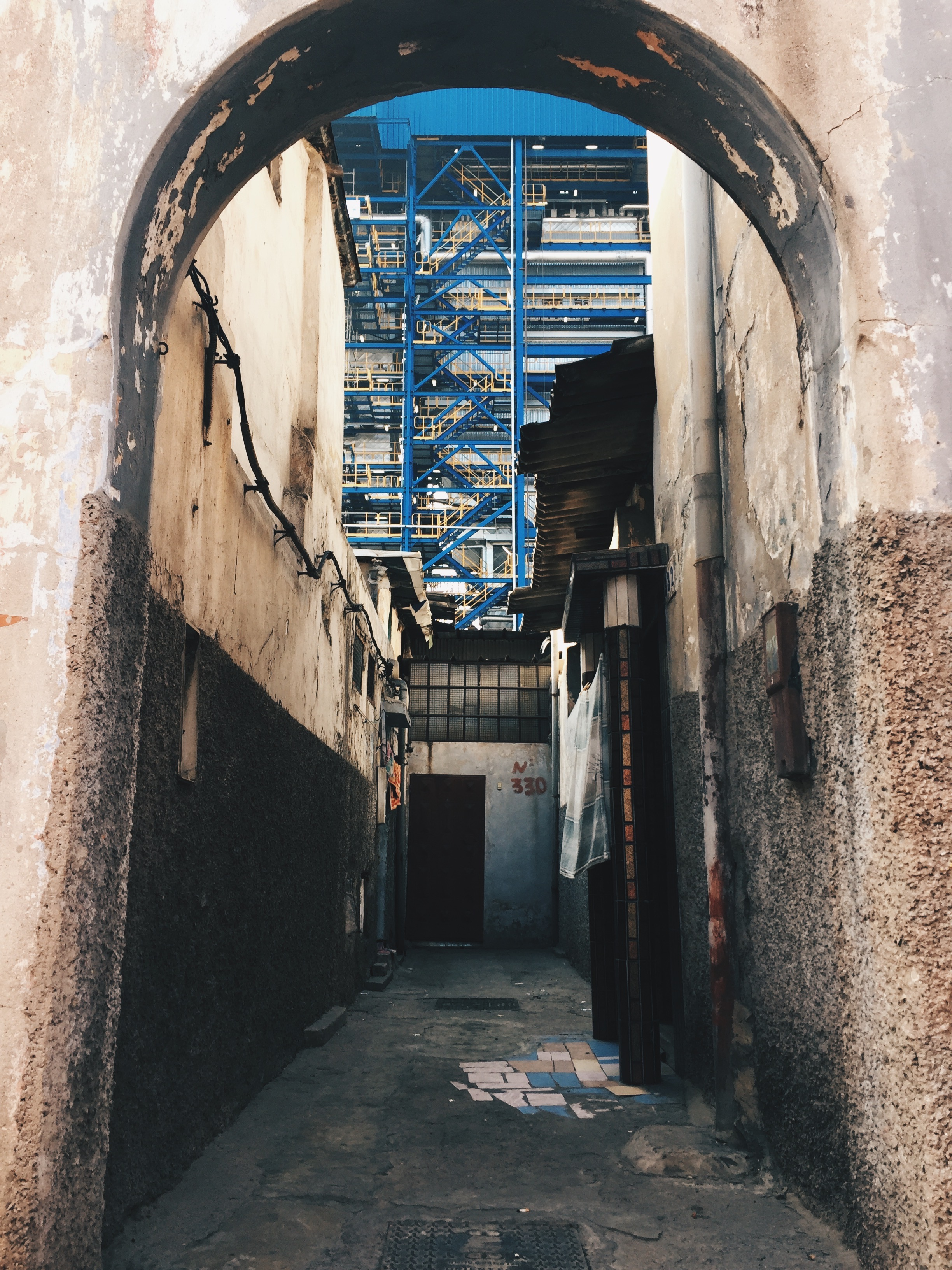 رؤية المصنع من داخل مدينة شركة السكر المغربية لتصفية في الدار البيضاء المغربية. في فترة الاستعمار، أنشأت شركة كوسومار حيا لإسكان عمالها المغاربة، وهذا الحي يتبع خصائص المدينة المغربية التقليدية.